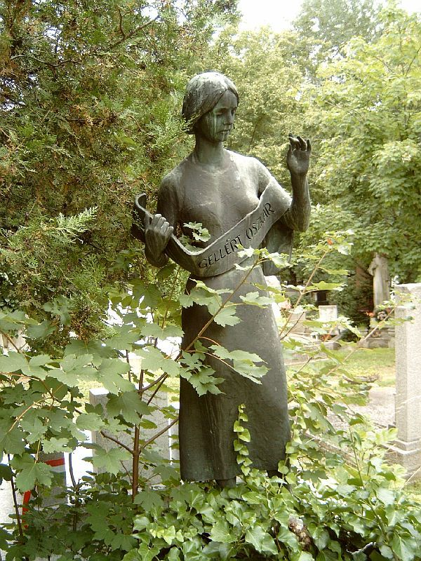 Gellért Oszkár sírja Pátzay Pál, 1968. - Budapest XII. kerület, Farkasréti temető: 8/3-1-21/22.